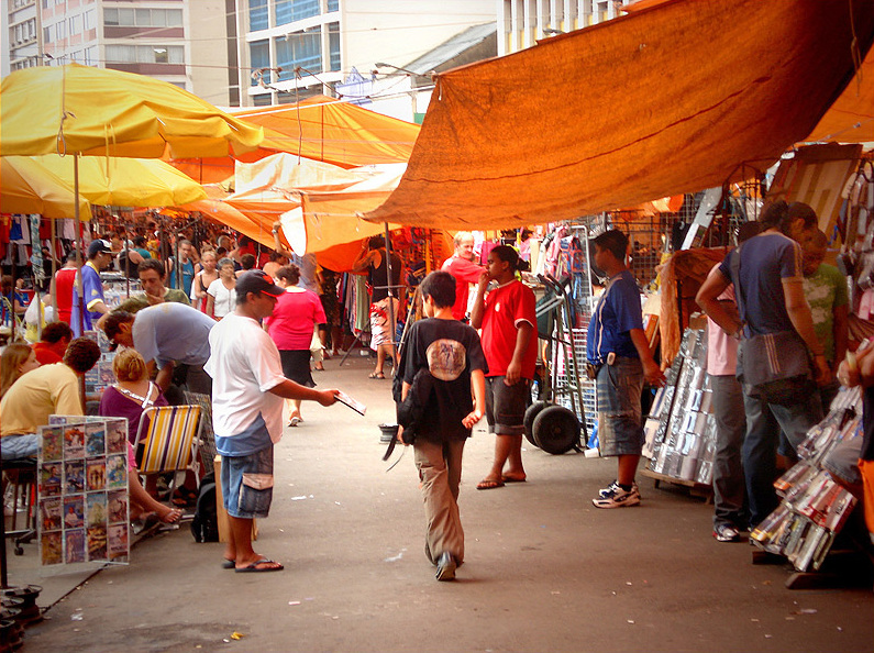 Comércio informal no centro de Porto Alegre, Brasil.